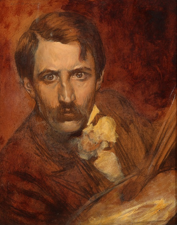 Autoritratto, olio su tela